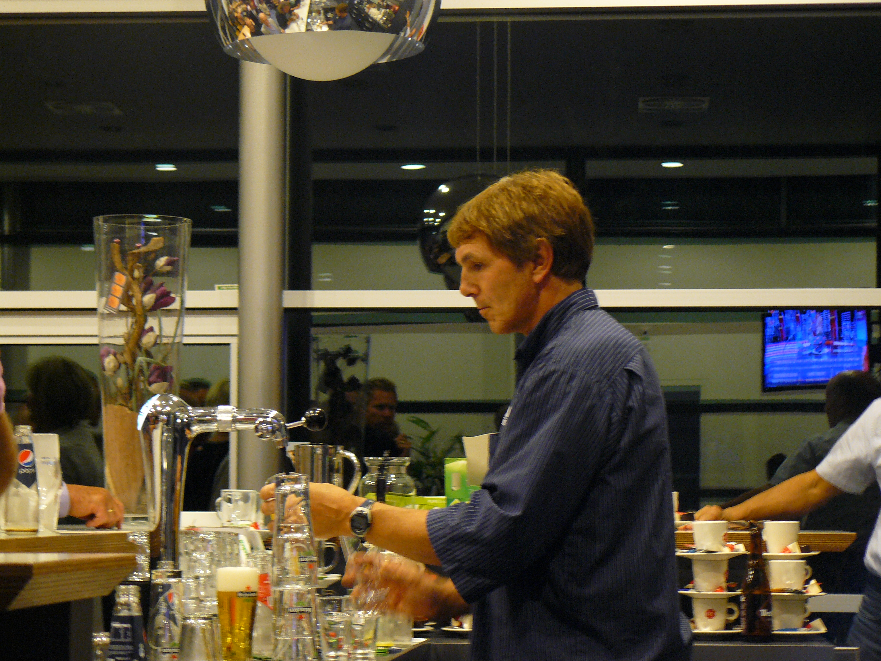 Jan Lohman.